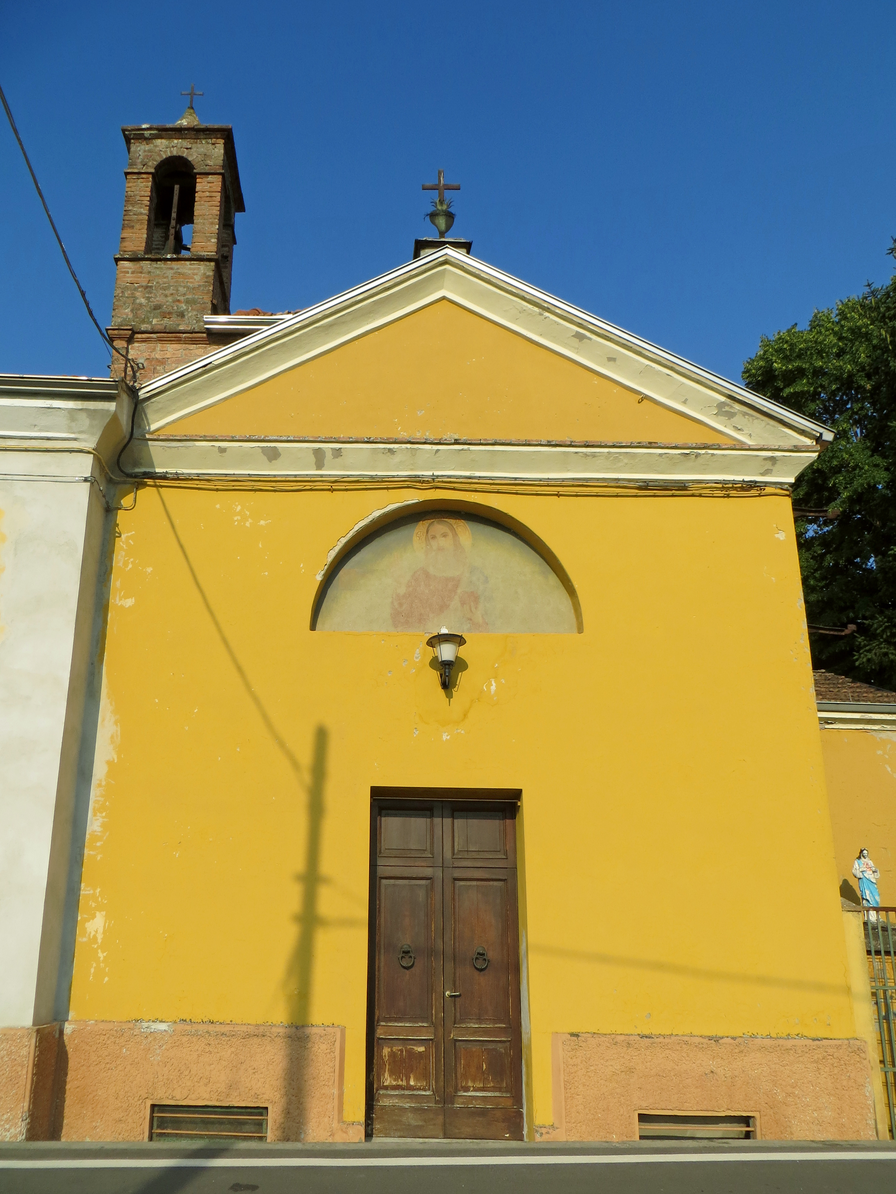 Oratorio del Sacro Cuore e di Santa Teresa di Gesù Bambino (Pontetaro, Fontevivo) - facciata